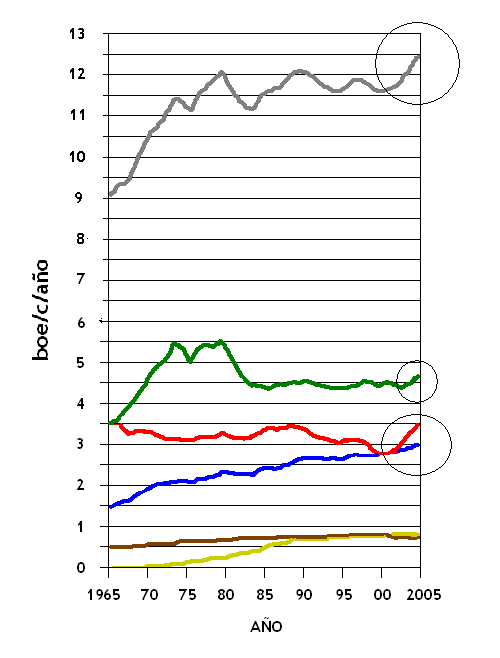 Consumo de energía per cápita a nivel mundial (línea gris) y desglosado en fuentes energéticas según (The Oil Drum (6 de marzo de 2006). «Revisiting the Olduvai Theory Revisiting the Olduvai Theory» (en inglés)) Petróleo en verde, carbón en rojo, gas en azul, hidroeléctrica en café y nuclear en amarillo.